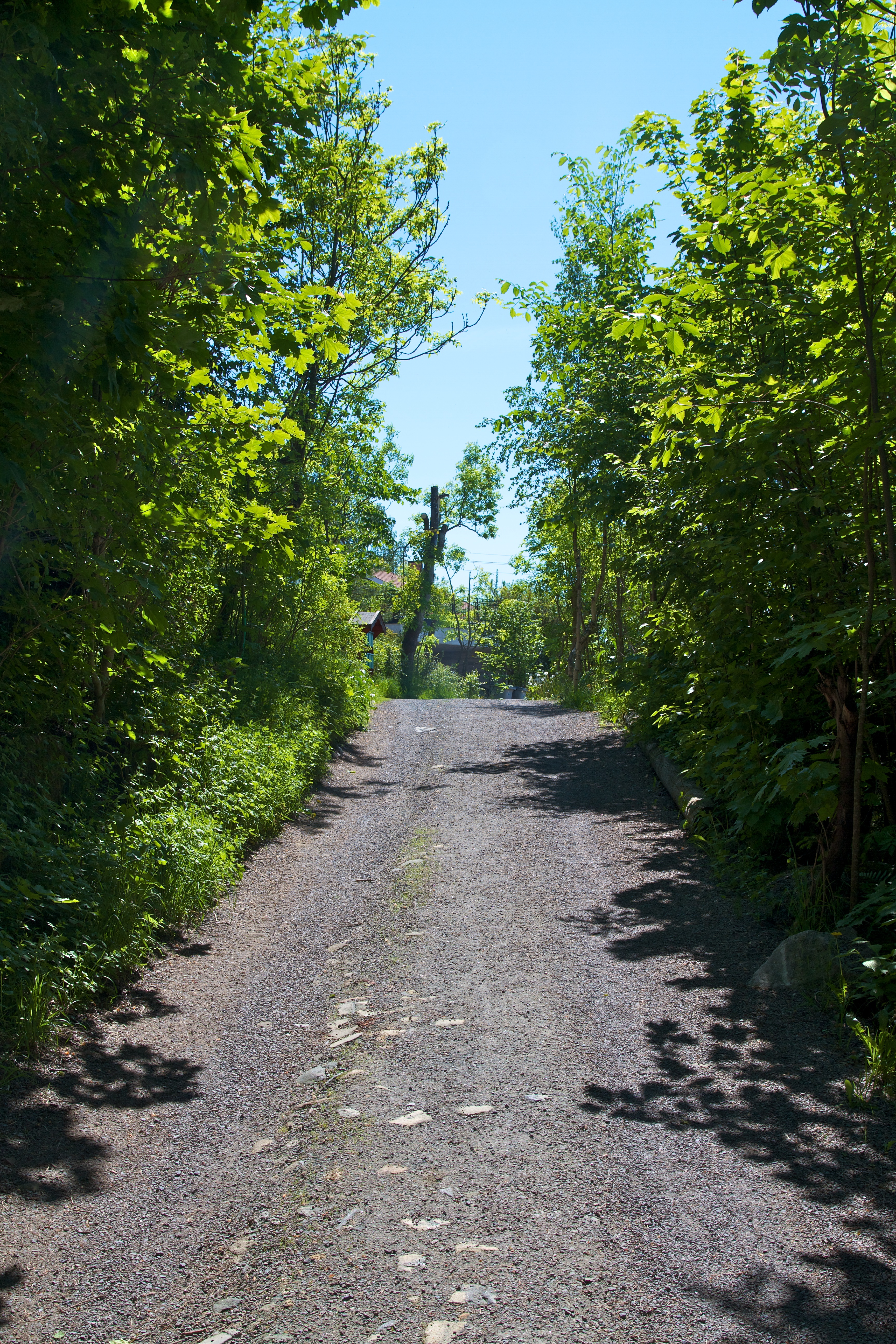 Oldtidsveien på Østensjø i Oslo.